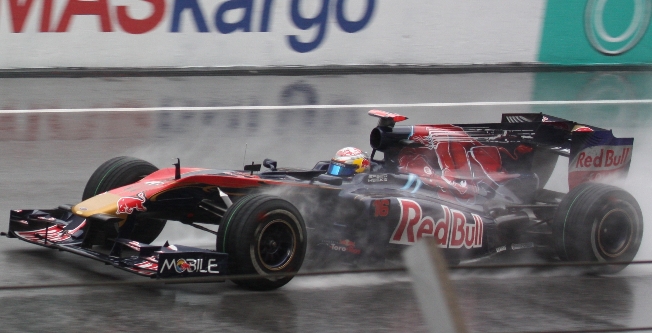 Buemi Malaysia 2010